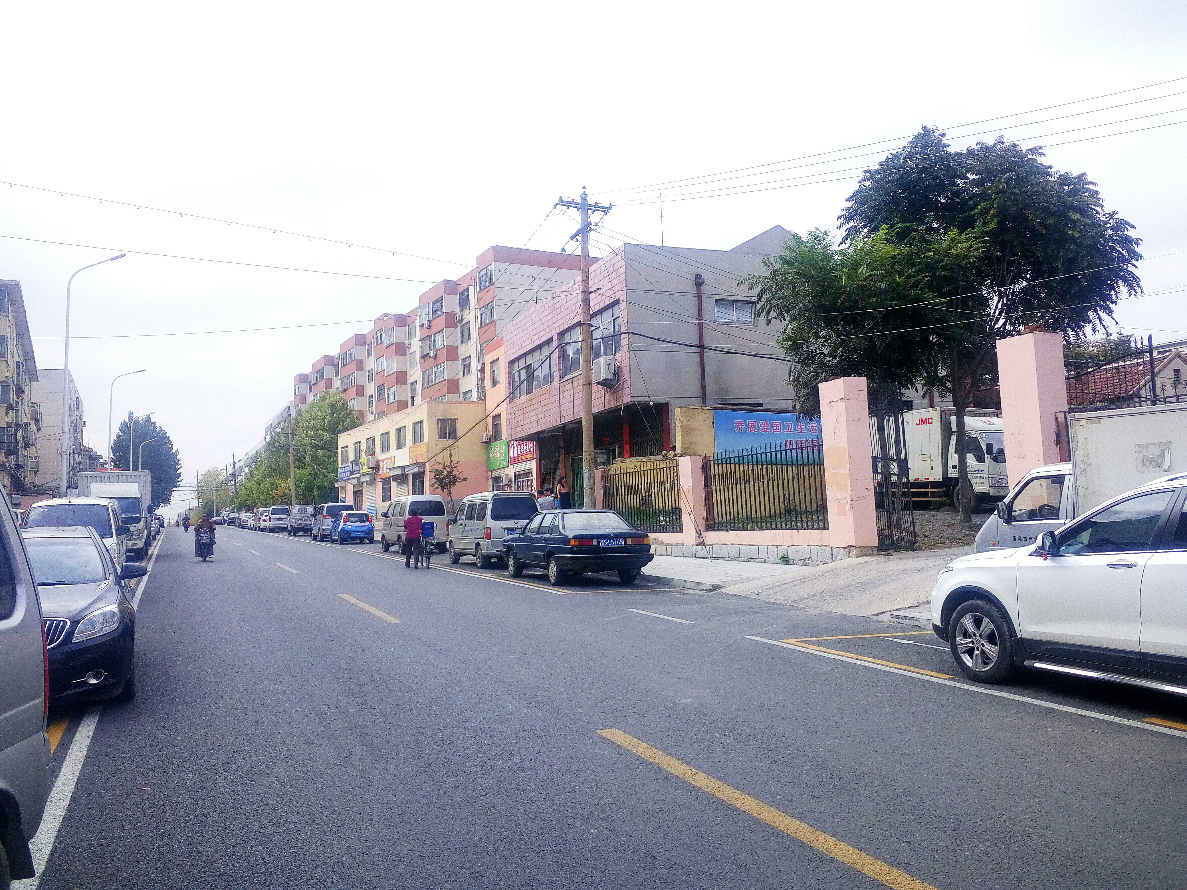 莱芜西关街